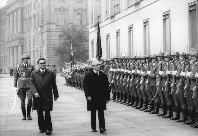 ADN-ZB Koard 29.10.76 Berlin: Der Generalsekretär des ZK der SED und Vorsitzender des Staatsrates der DDR Erich Honecker (M.) wurde am 29.10.76 im Amtssitz des Staatsrates mit militärischen Ehren empfangen. Unter den Klängen des Yorkschen Marsches schritt er die Front der Formation der Land-, Luft- und Seestreitkräfte ab.